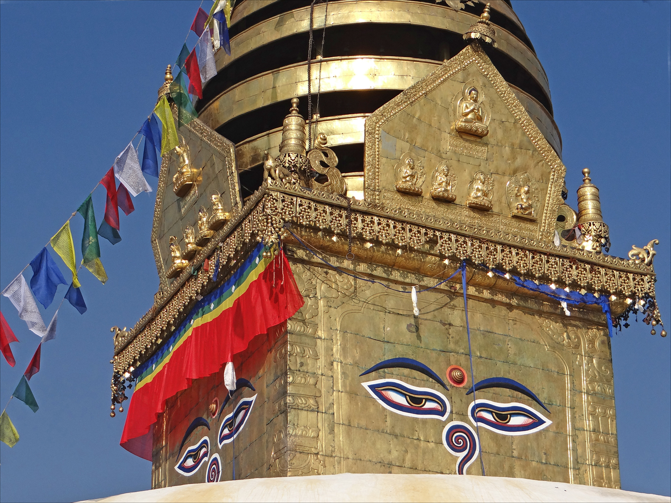 Le temple bouddhique de Swayambhunath (appelé également Temple des singes en raison des macaques rhésus qui y vivent) est un site classé au patrimoine mondial de l'UNESCO. Il domine la ville de Katmandou et il est célèbre pour son grand stupa dont le bloc cubique qui soutient la flèche est orné du regard du Bouddha sur chacune de ses faces. Le signe à l'emplacement du nez est le chiffre Un (Ek) en népali, qui est le symbole de l'unité de toute vie. Entre les yeux, le troisième oeil représente la clairvoyance du Bouddha.